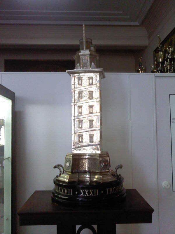 Taça Teresa Herrera de 1977 conquistada pelo Fluminense Football Club.